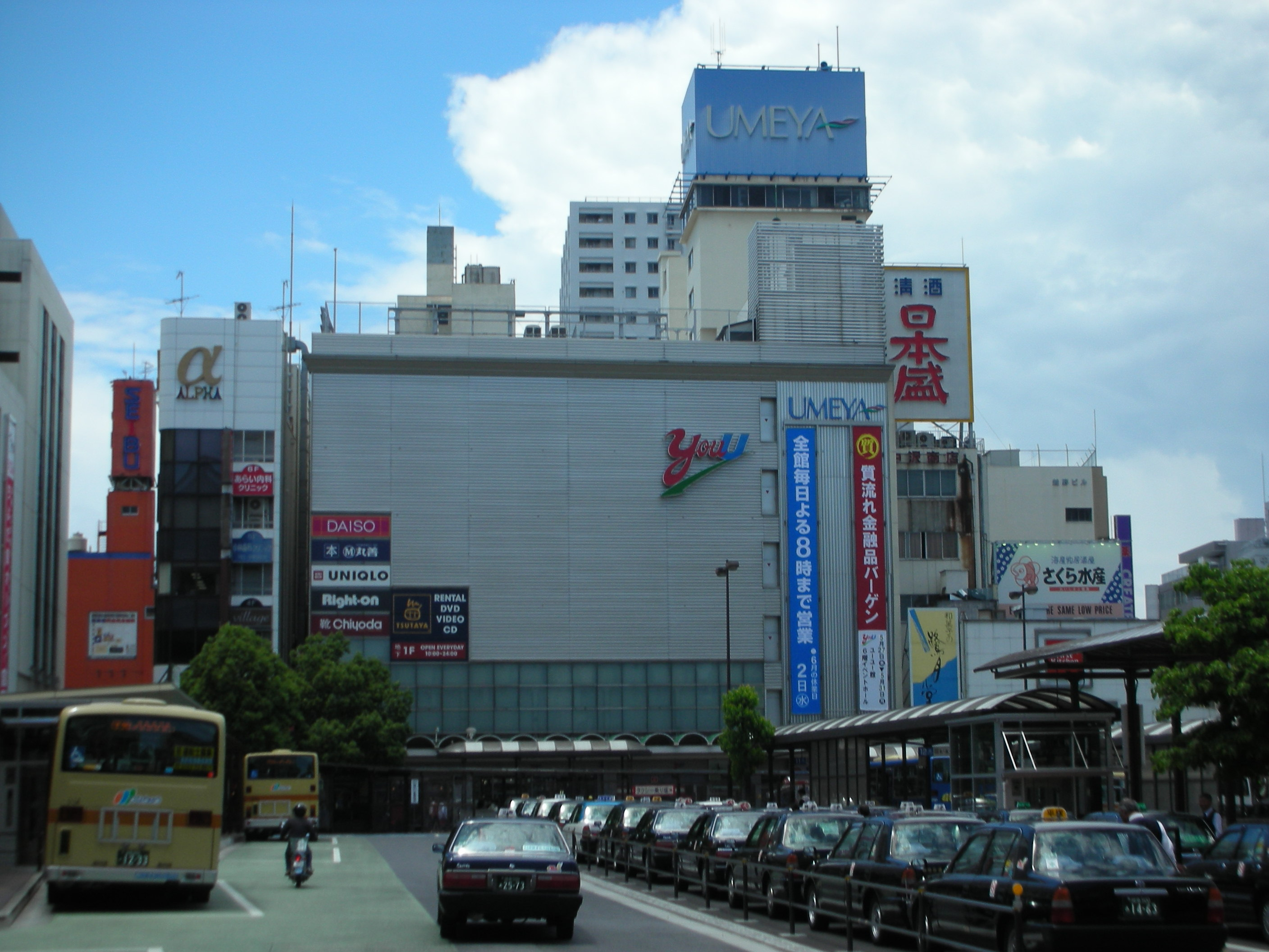 梅屋の外観